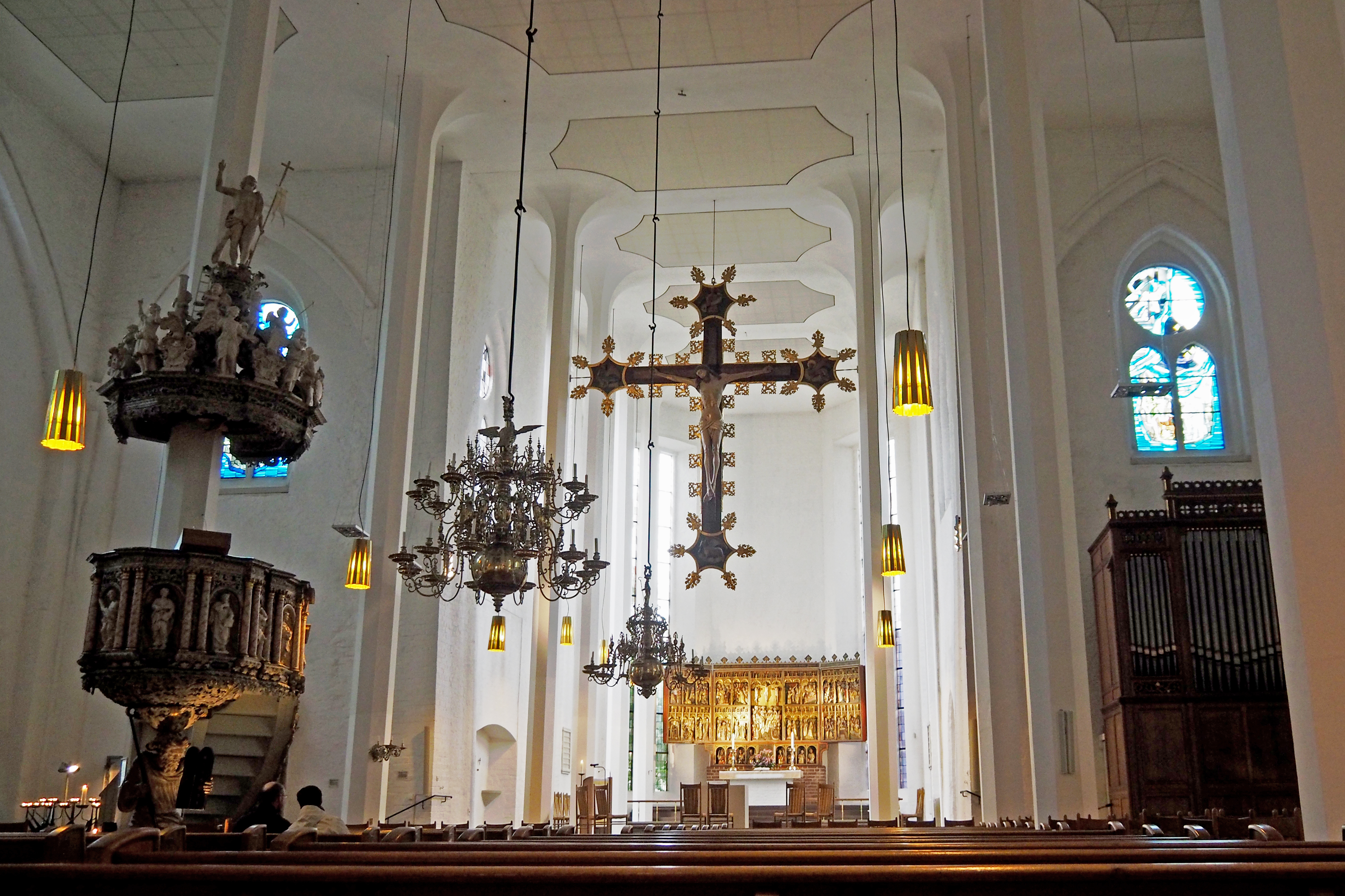 Innenraum der St. Nikolai-Kirche Kiel, mit Kanzel, Altar, Kruzifix und Chororgel